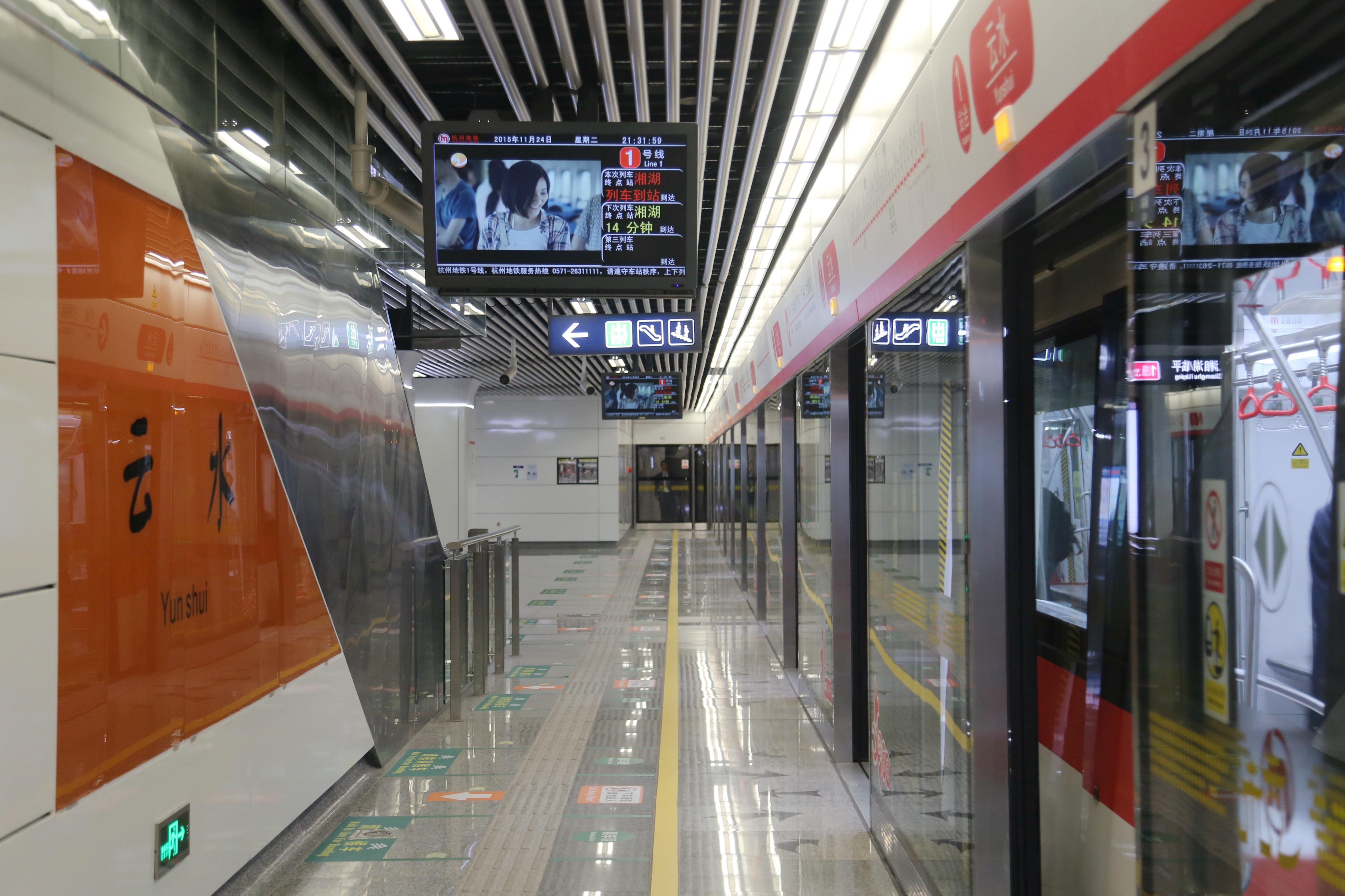 云水站站台标准角度